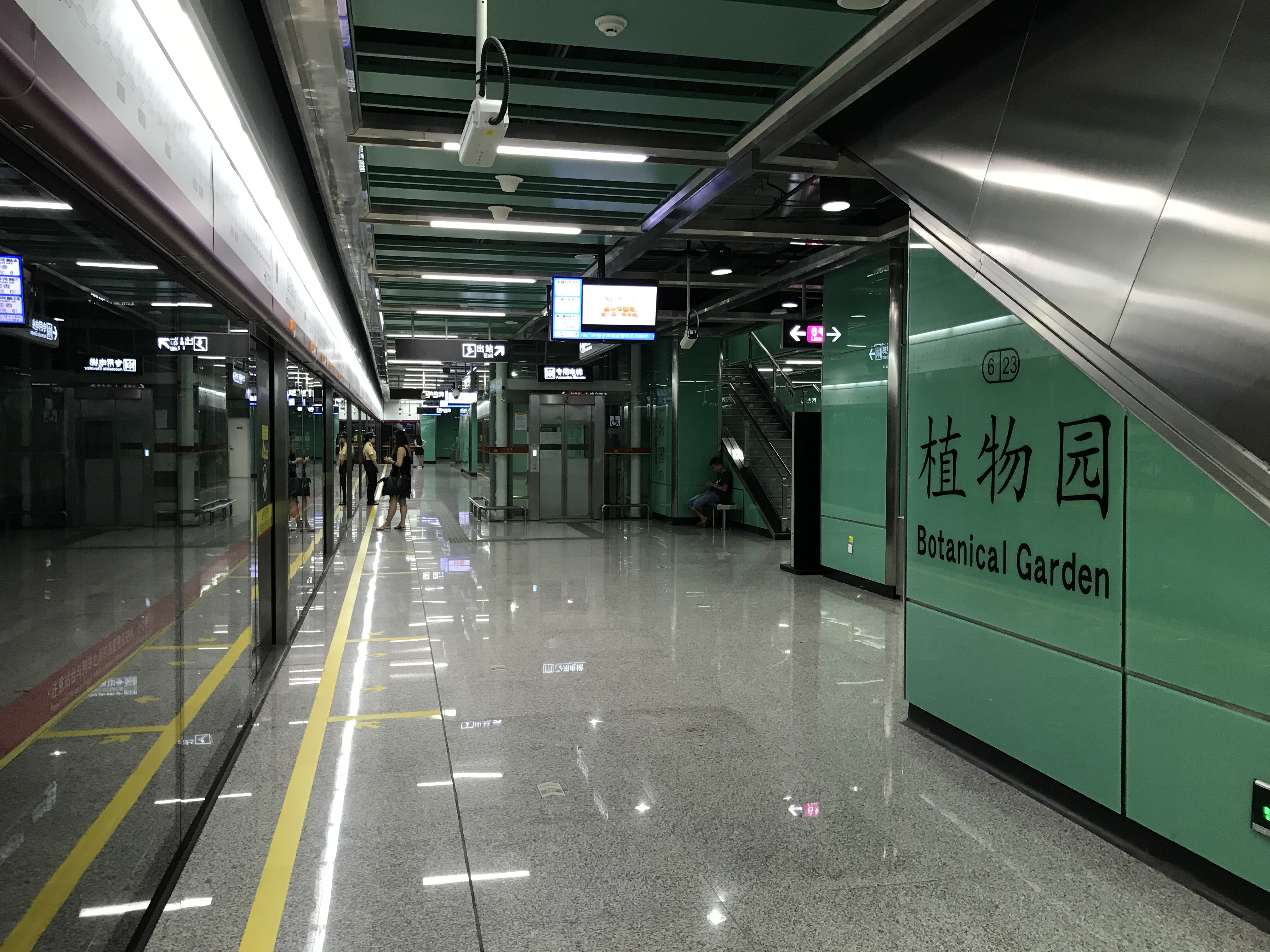 广州地铁植物园站